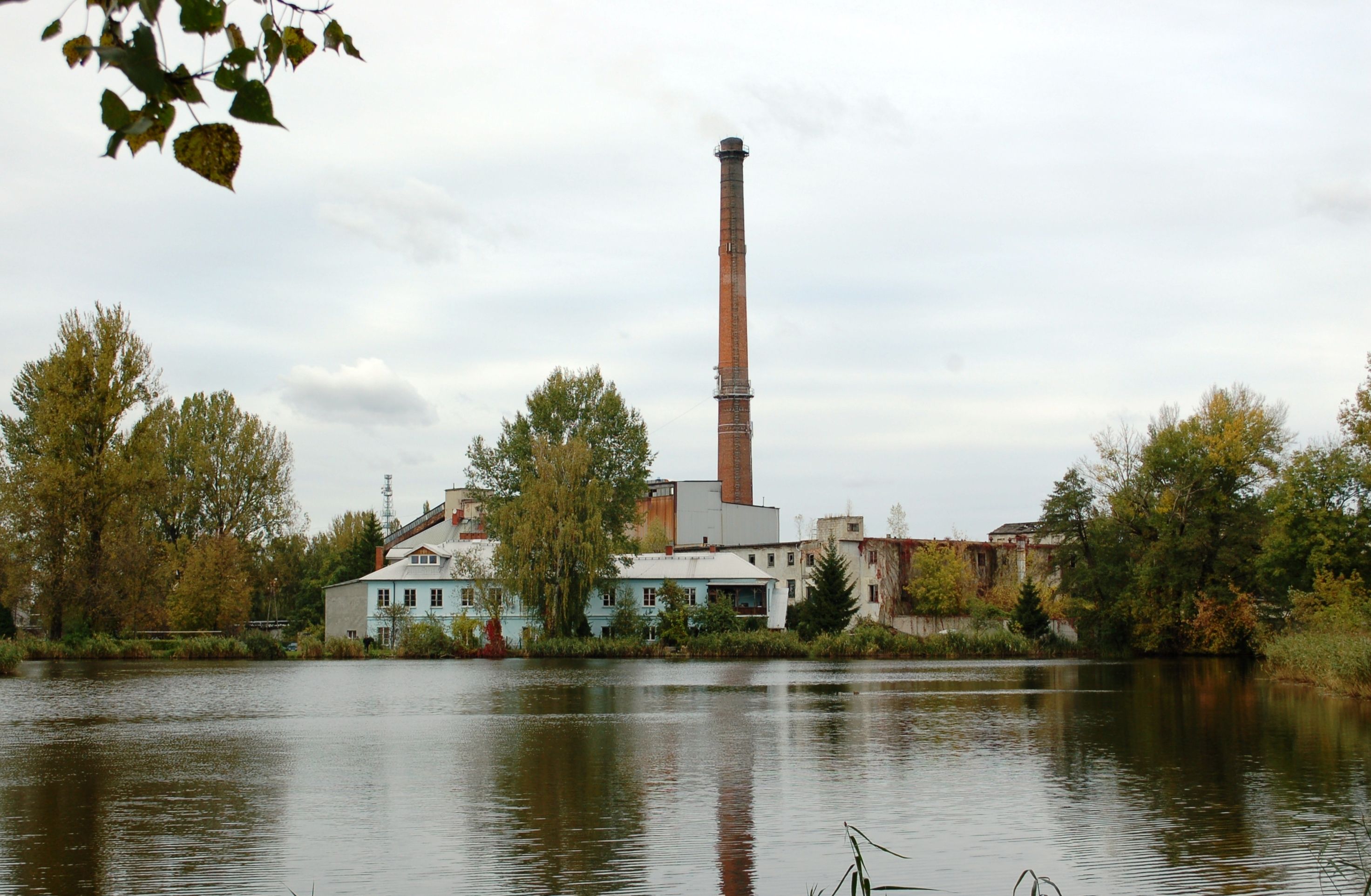 Papierfabrik Konstancin-Jeziorna, Konstans Sp.z o.o. (Metsä-Tissue)